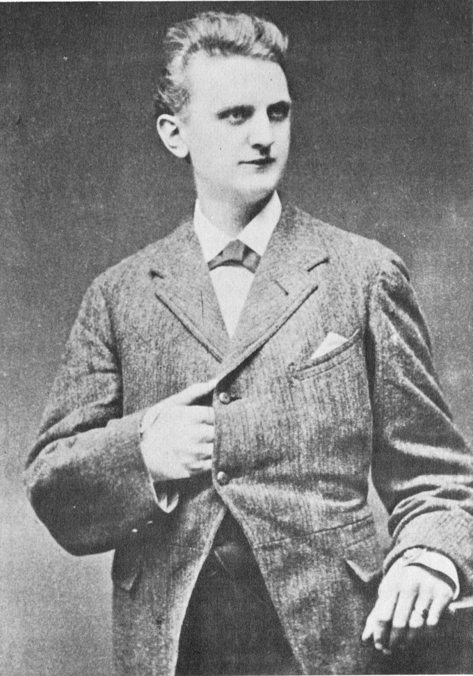 Max Conrad (* 1848 in München; † 31. Dezember 1920 in Aschaffenburg), Habilitation 1875 Würzburg, ab 1878 Prof. an der Forstschule in Aschaffenburg